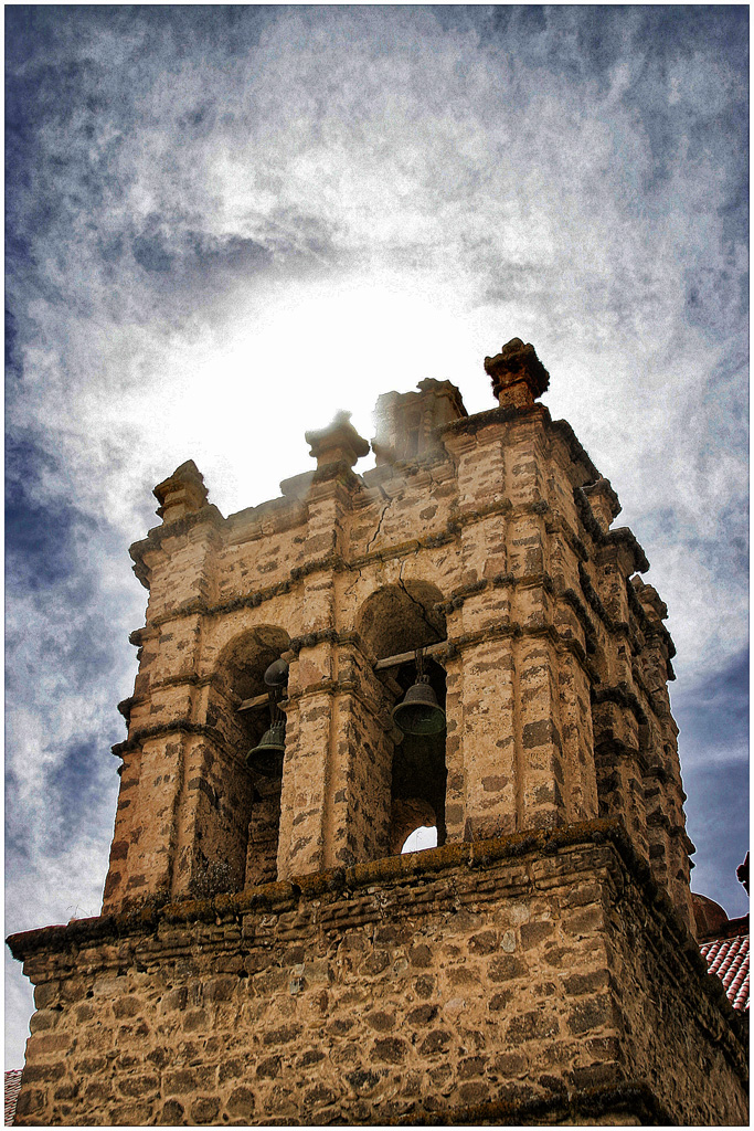 a 125 km. de la ciudad de La Paz, es instrumento de integración de cuatro comunidades aymaras: Capunuto al Norte, Collana al Sur, Uchusuma al Este y Maca al Oeste.